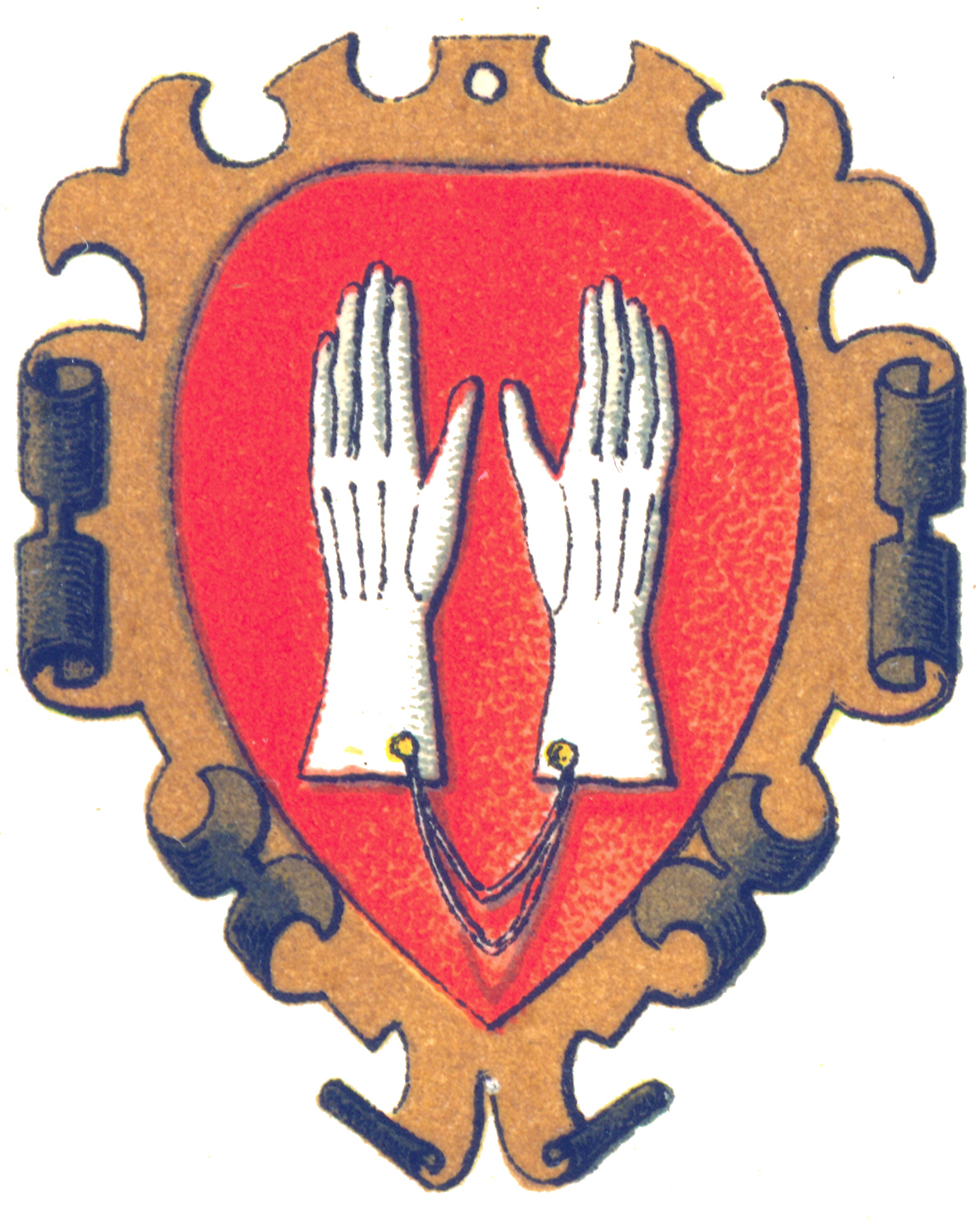 Zunftwappen Handschumacher